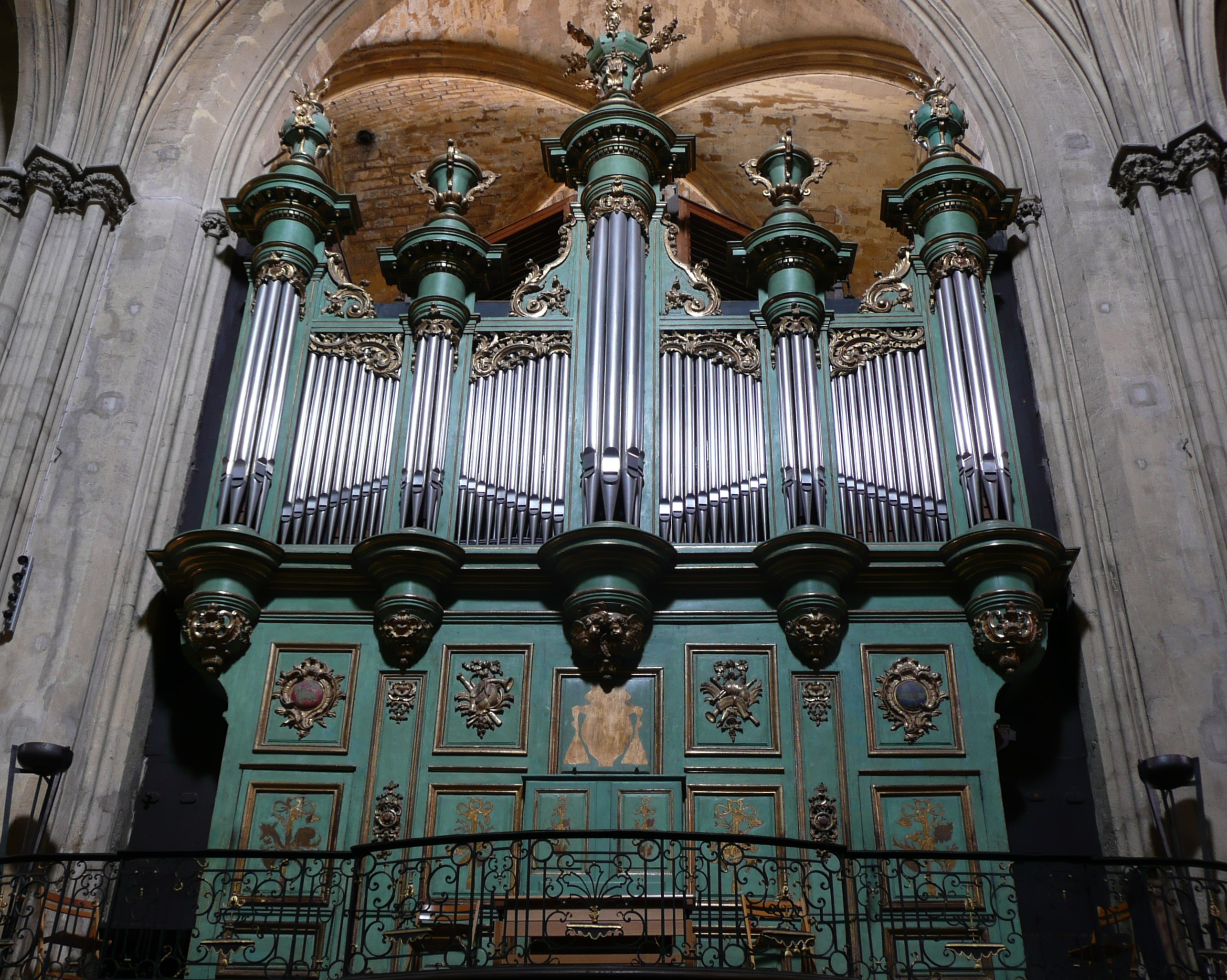 Côté Evangile,le buffet ayant contenu l'instrument de J.E.Isnard 1746 et abritant désormais l'orgue de Ducroquet de 1855, modifié par Aristide Cavaillé-Coll en 1880, restauré en 2003 par la Manufacture Languedocienne de Grandes Orgues de Lodève